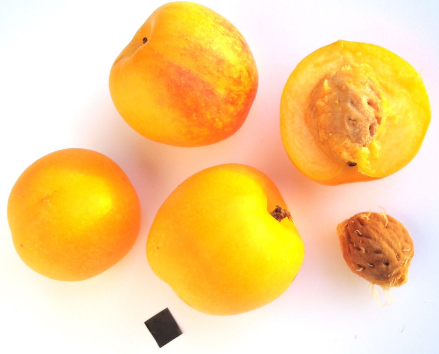 Picture of Nectacot-fruitz (Prunus)